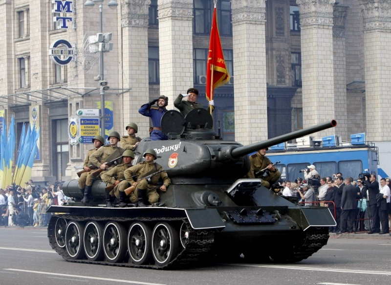 Парад перемоги, Київ.